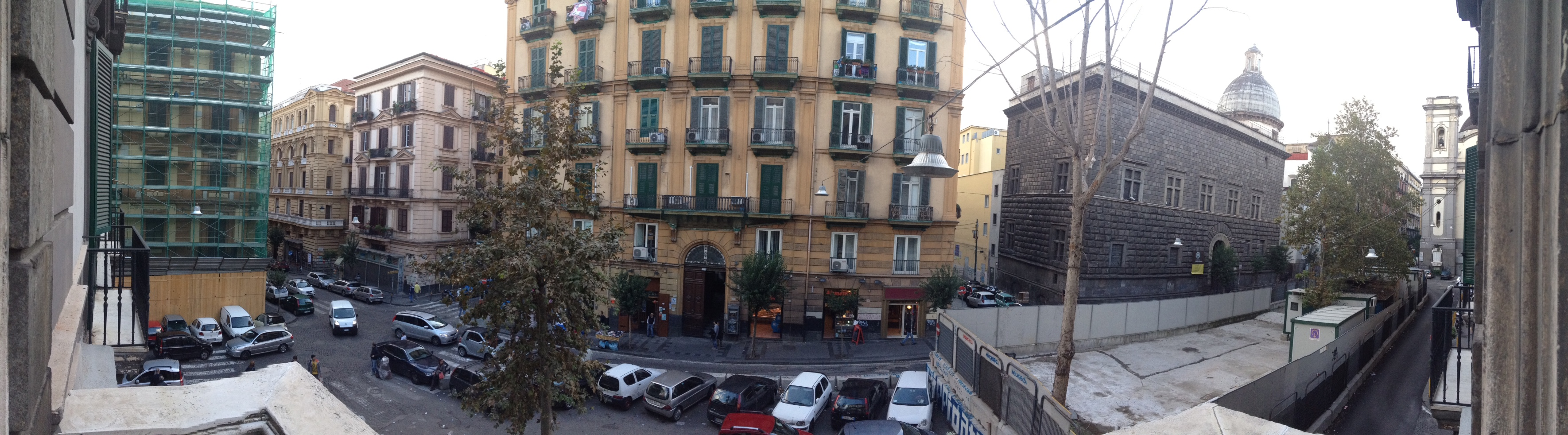 Piazza Museo Filangieri in foto panoramica